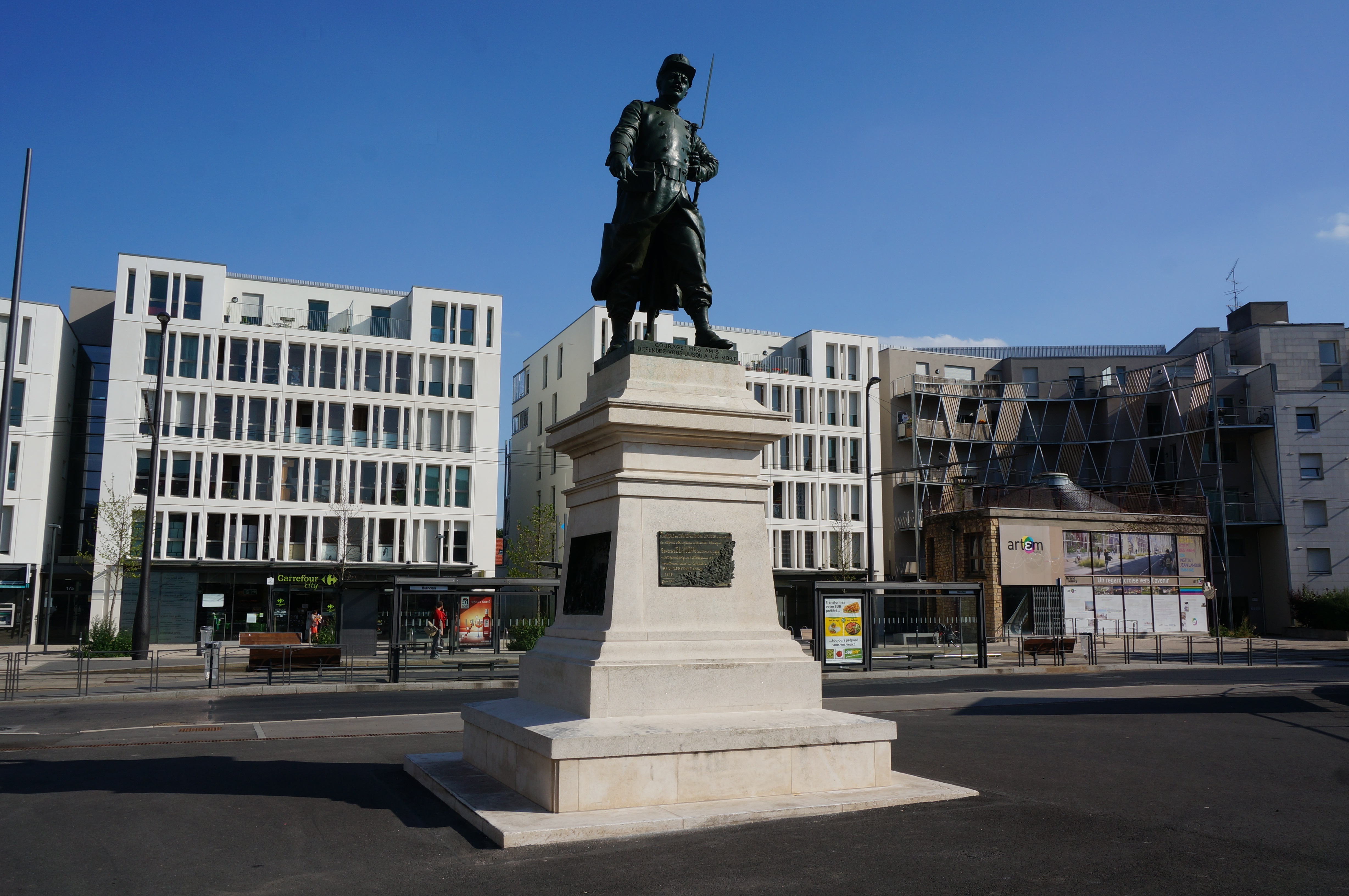 Vue d'Artem et de la staute Blandan.